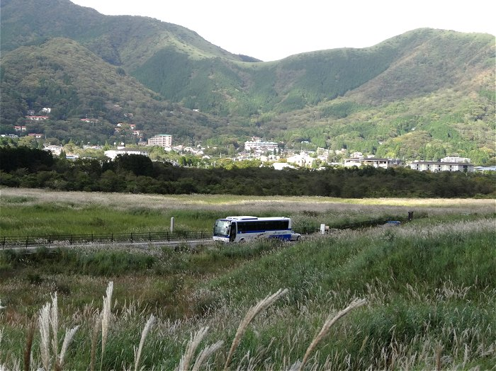 ジェイアールバス関東 東京箱根号